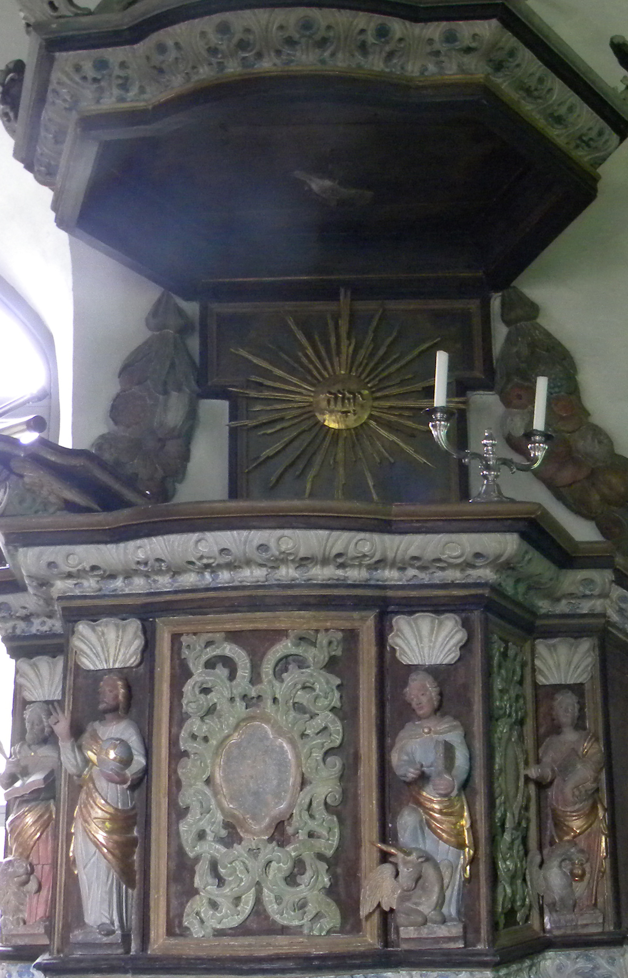 Predikstol från 1700-talet med tetragrammet JHWH i solsymbolen i Borgviks kyrka